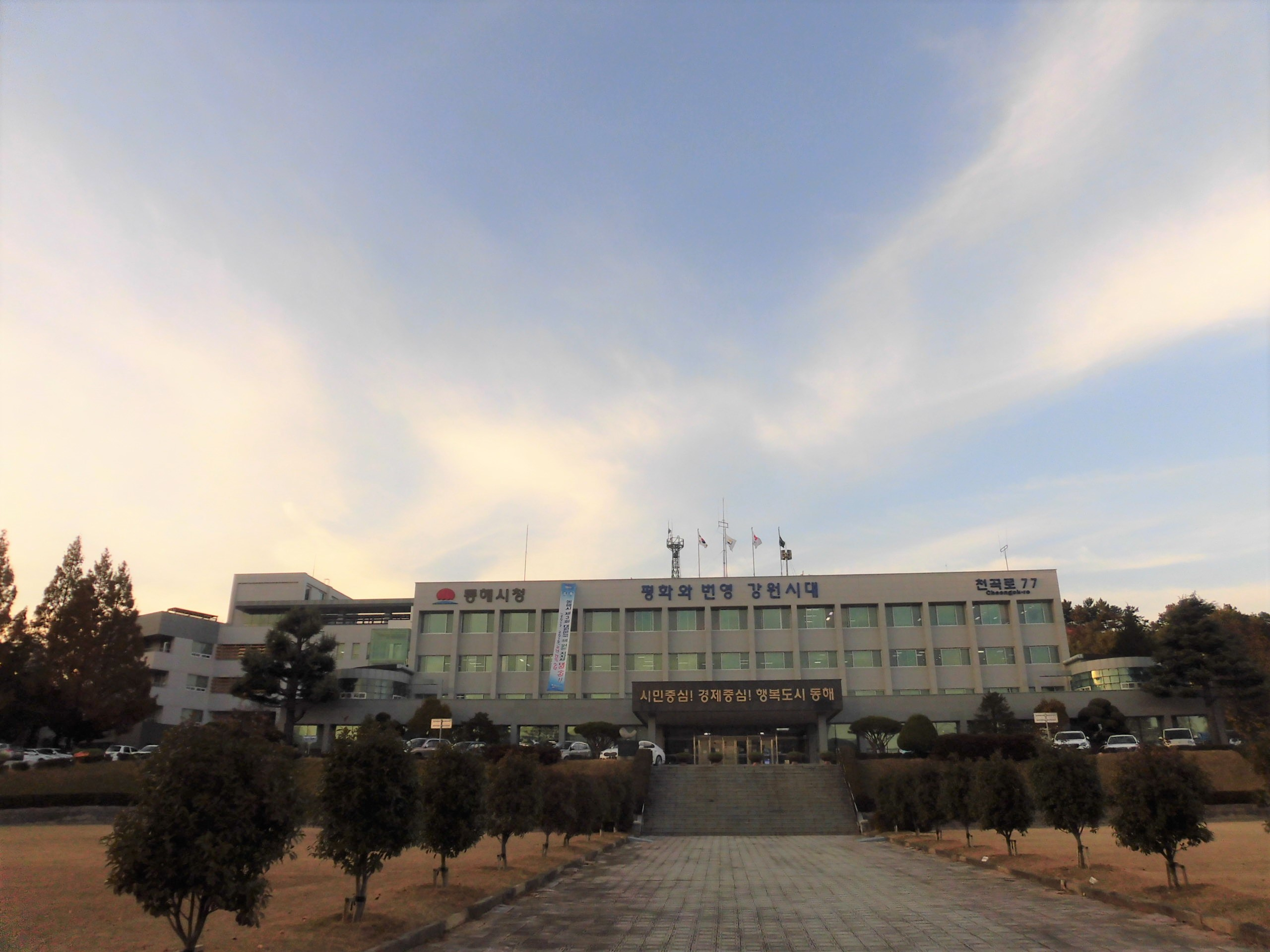 강원도 동해시에 있는 동해시청